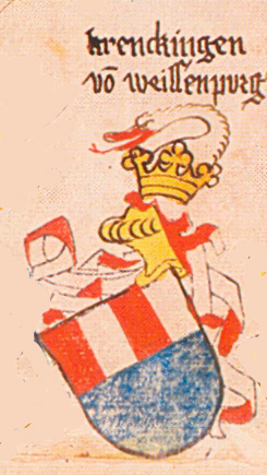 Ingeram-Codex der ehemaligen Bibliothek Cotta krenckingen von weissenpurg freigestellt aus